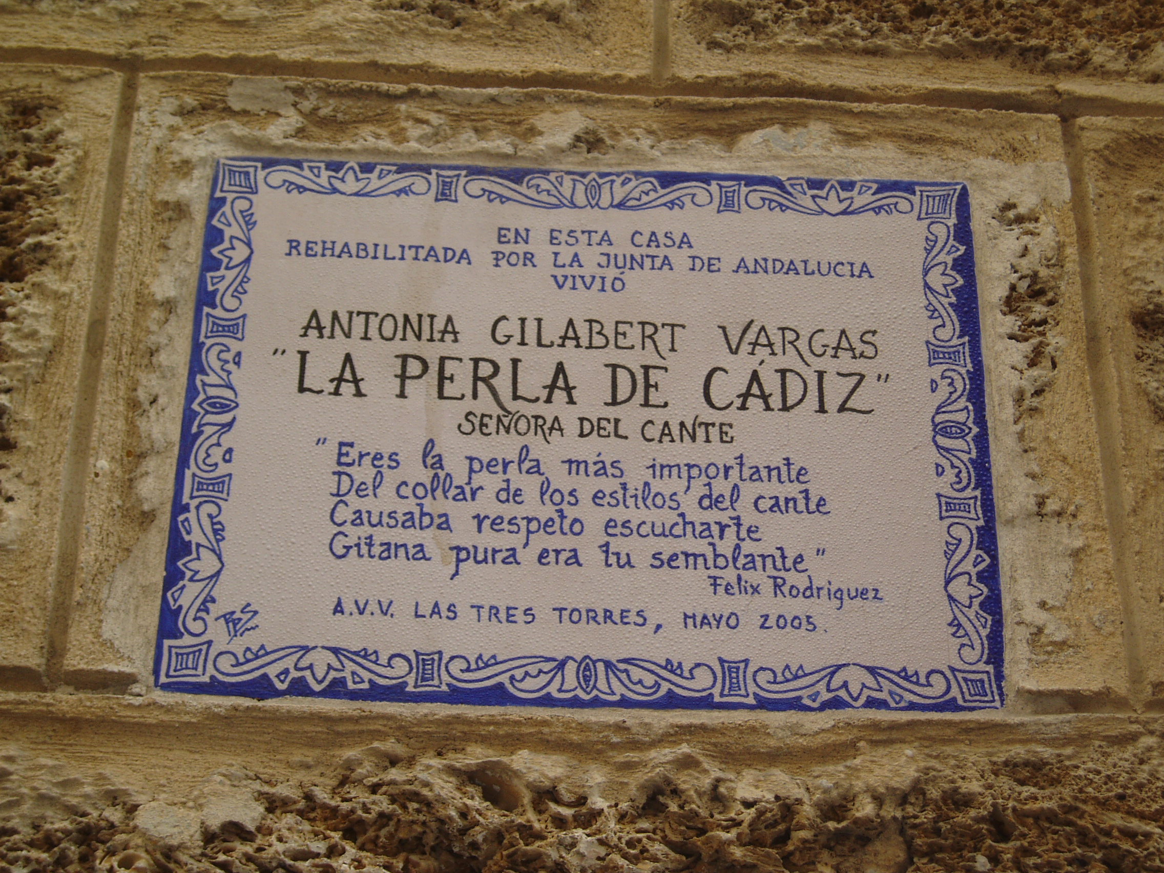 Placa en Cádiz, España.